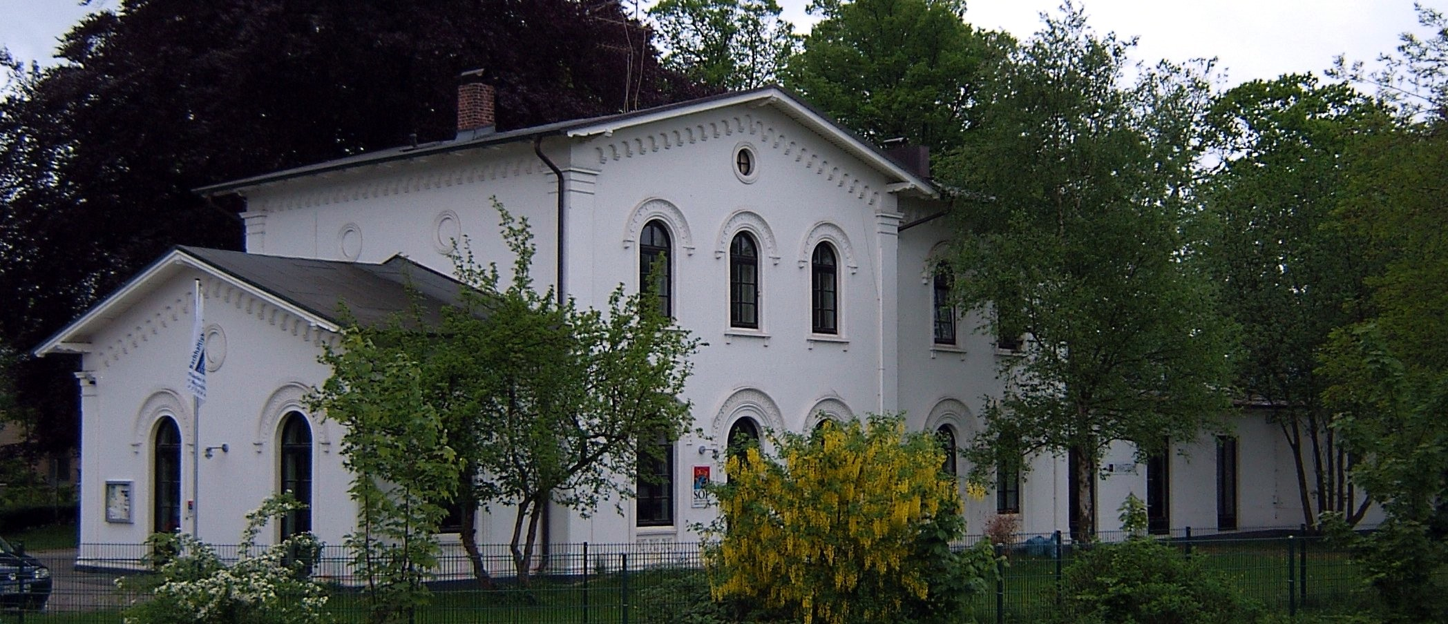 Hamburg, Klein Flottbek, ehem. Bahnhof